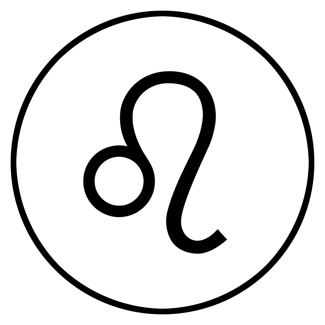 Symbole astrologique du Lion